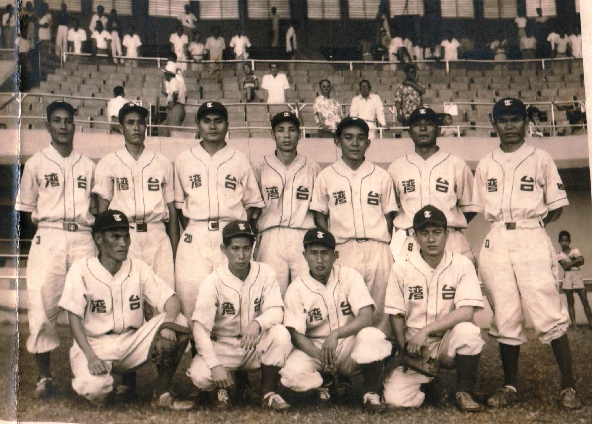 中文（台灣）: 1951年台灣棒球隊教練李詩計（後排右一，是嘉農棒球隊的第一代球員、優秀的外野手）與入選台灣棒球隊嘉農球員，在菲律賓黎剎球場合照的照片，球衣寫著「台灣」兩個漢字。